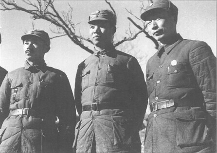 1938年3月，关向应、彭真、聂荣臻在晋察冀边区。